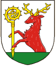 Znak obce Ústín